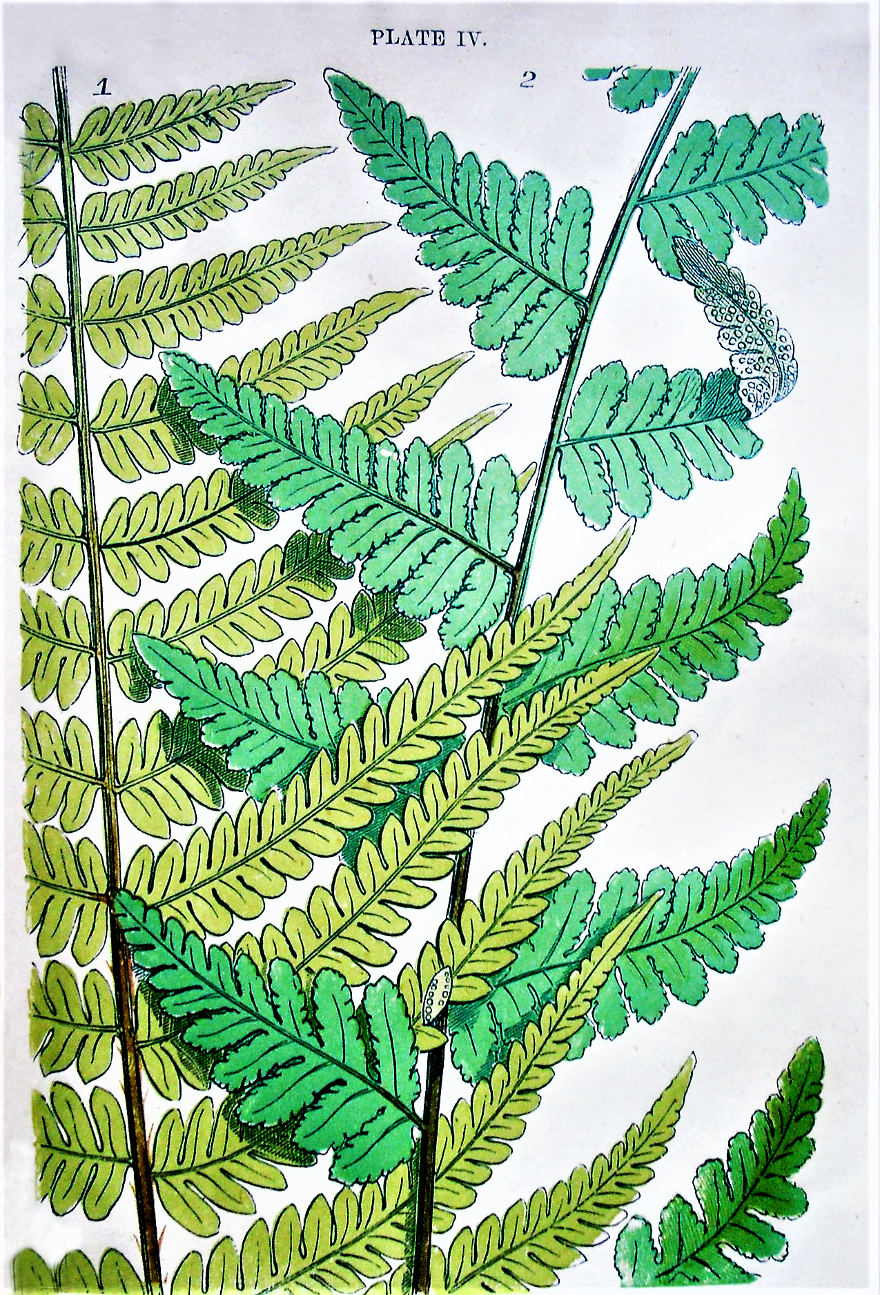 Mordecai Cubitt Cooke: Farne (1867)